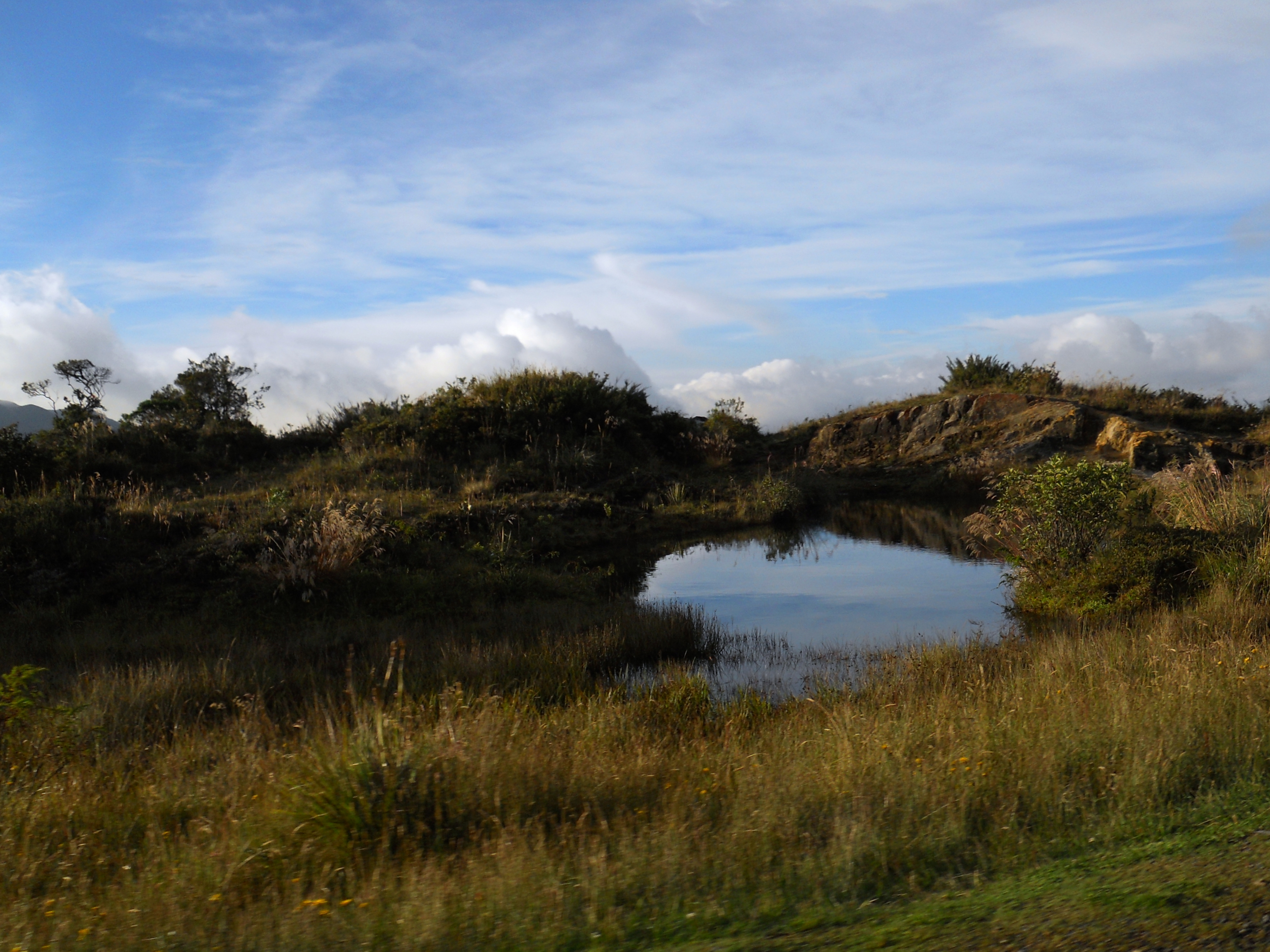 Pequeña laguna en el páramo de Cruz Verde.